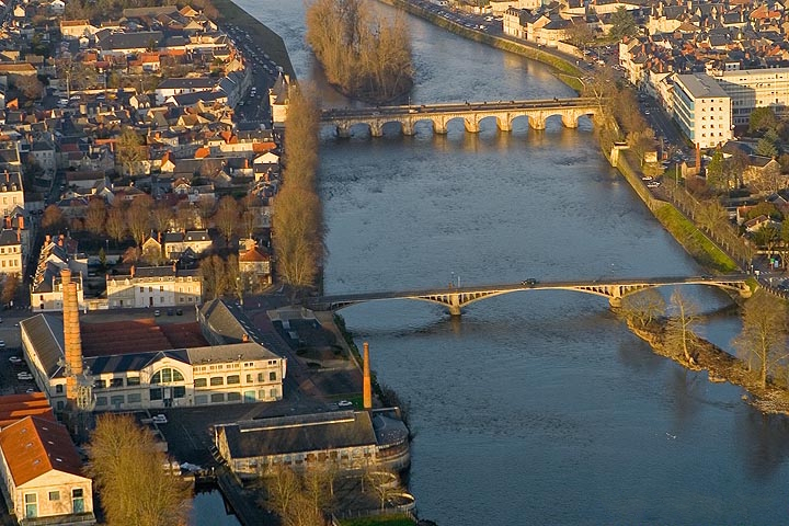 Vue sud du centre de Châtellerault.